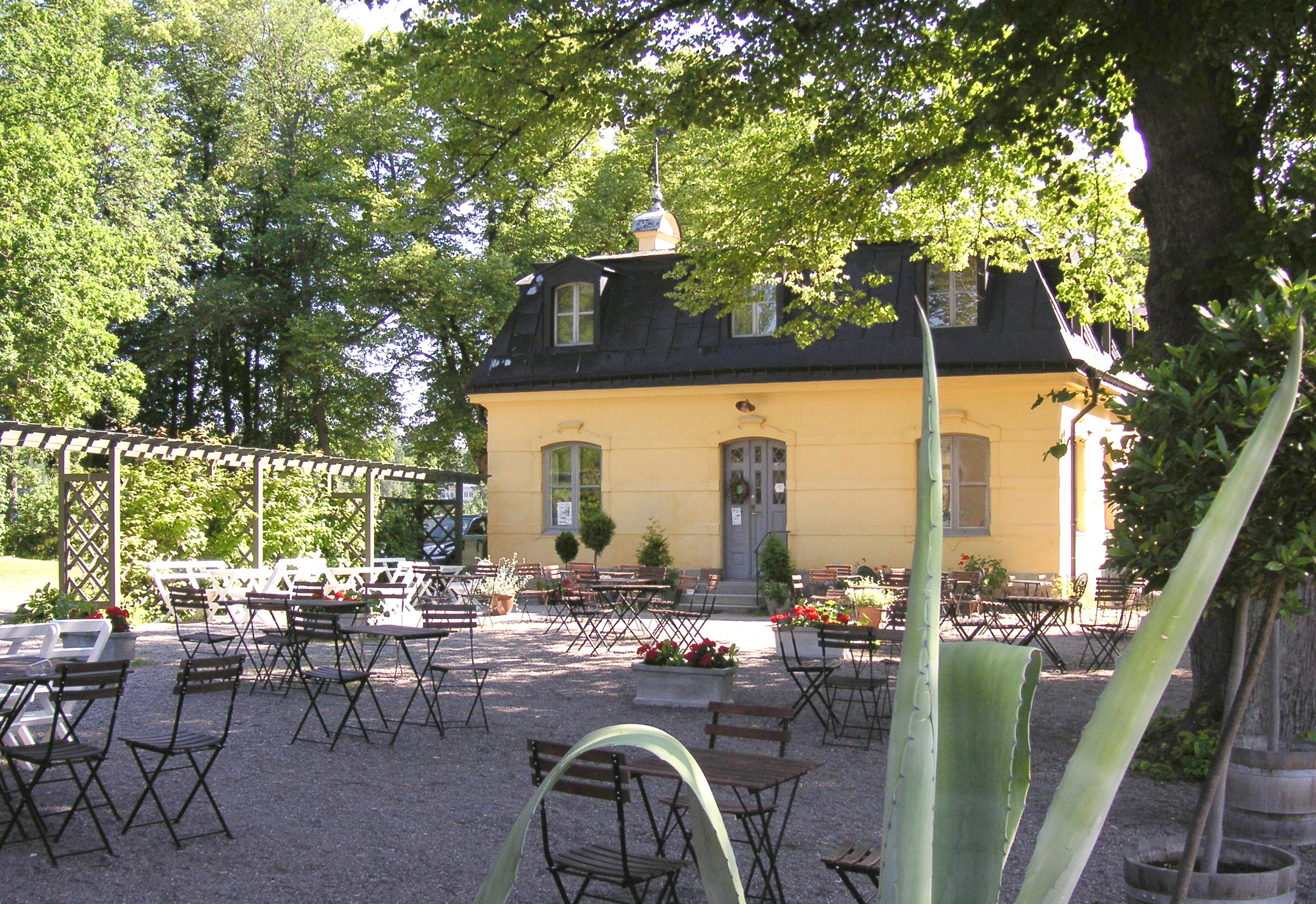 Slottskaffe på Ulriksdal, tidigare slottets kök, ritat 1862 av arkitekt Fredrik Wilhelm Scholander